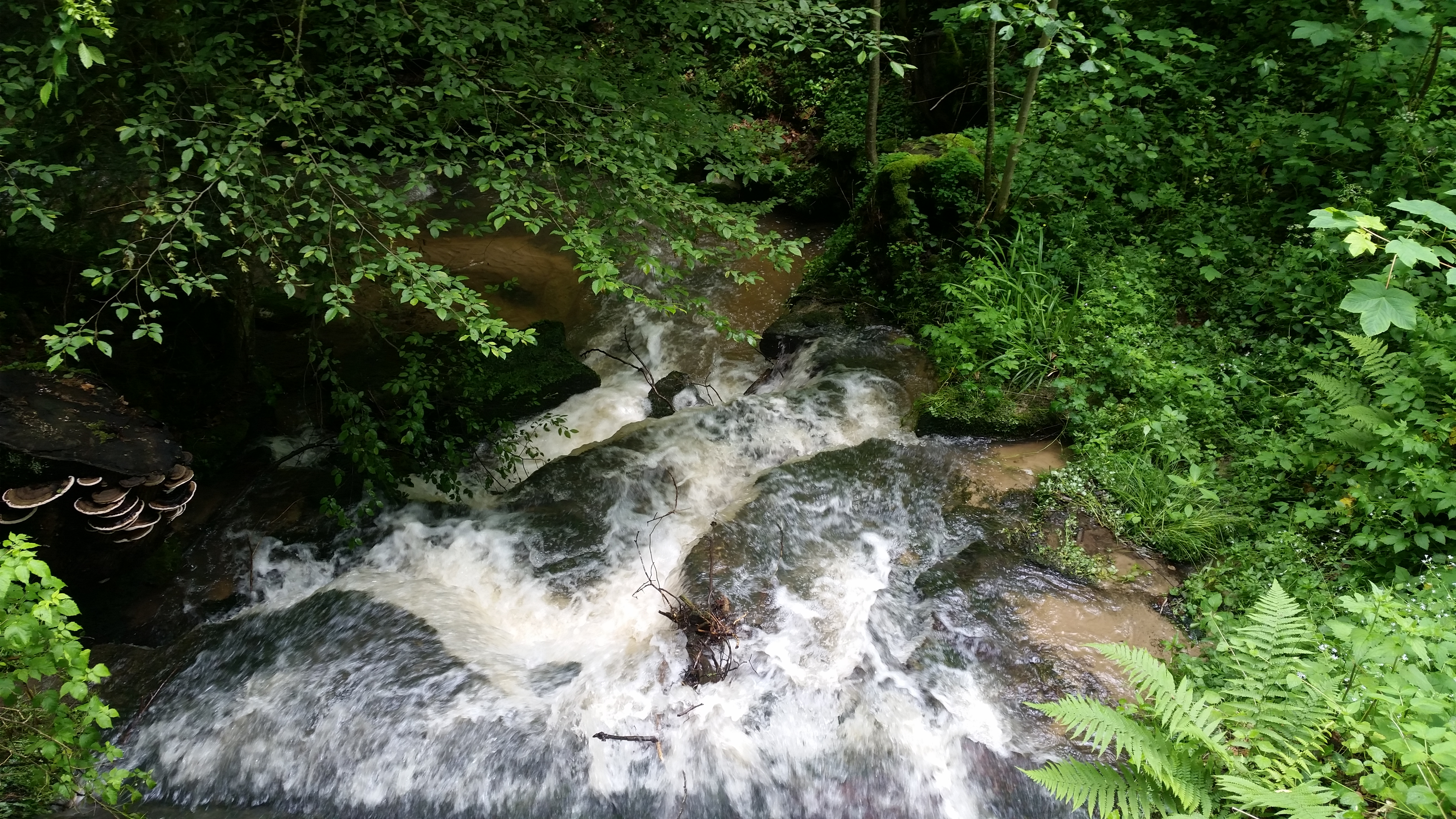 Fluss von Kirchenkirnberg nach Fichtenberg